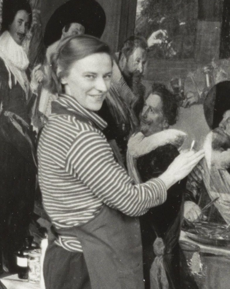 CollectieCollectie Fotoburo de BoerInventarisnummerNL-HlmNHA_54020664NL-HlmNHA_1478_24982KBeschrijvingAnne van Grevenstein bezig met de restauratie van de Schuttersstukken van Frans Hals.FotonummerNL-HlmNHA_1478_3187DocumenttypeTopografische prenten, tekeningen en foto'sVervaardigerBoer, Poppe de Soort vervaardigerFotograaf Interieur/ExterieurInterieurAnnotatiesHD141087LandNederland ProvincieNoord-Holland GemeenteHaarlem PlaatsHaarlem StraatGroot Heiligland GeografischCentrum Datering gebeurtenis14-10-1987TechniekFoto TrefwoordenMusea